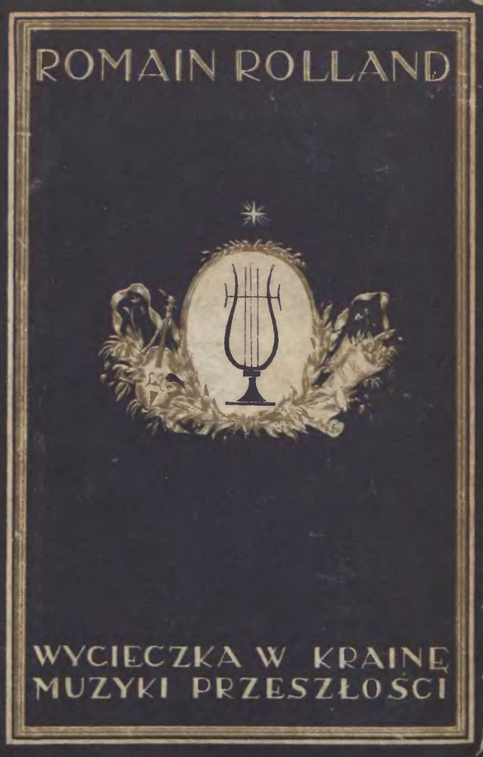 Okładka książki "Wycieczka w krainę muzyki przeszłości", Wydawnictwo Polskie R. Wegner